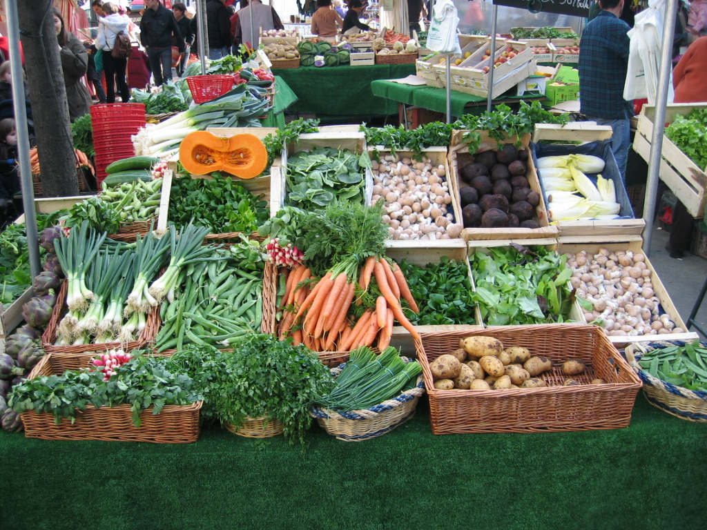 Légumes